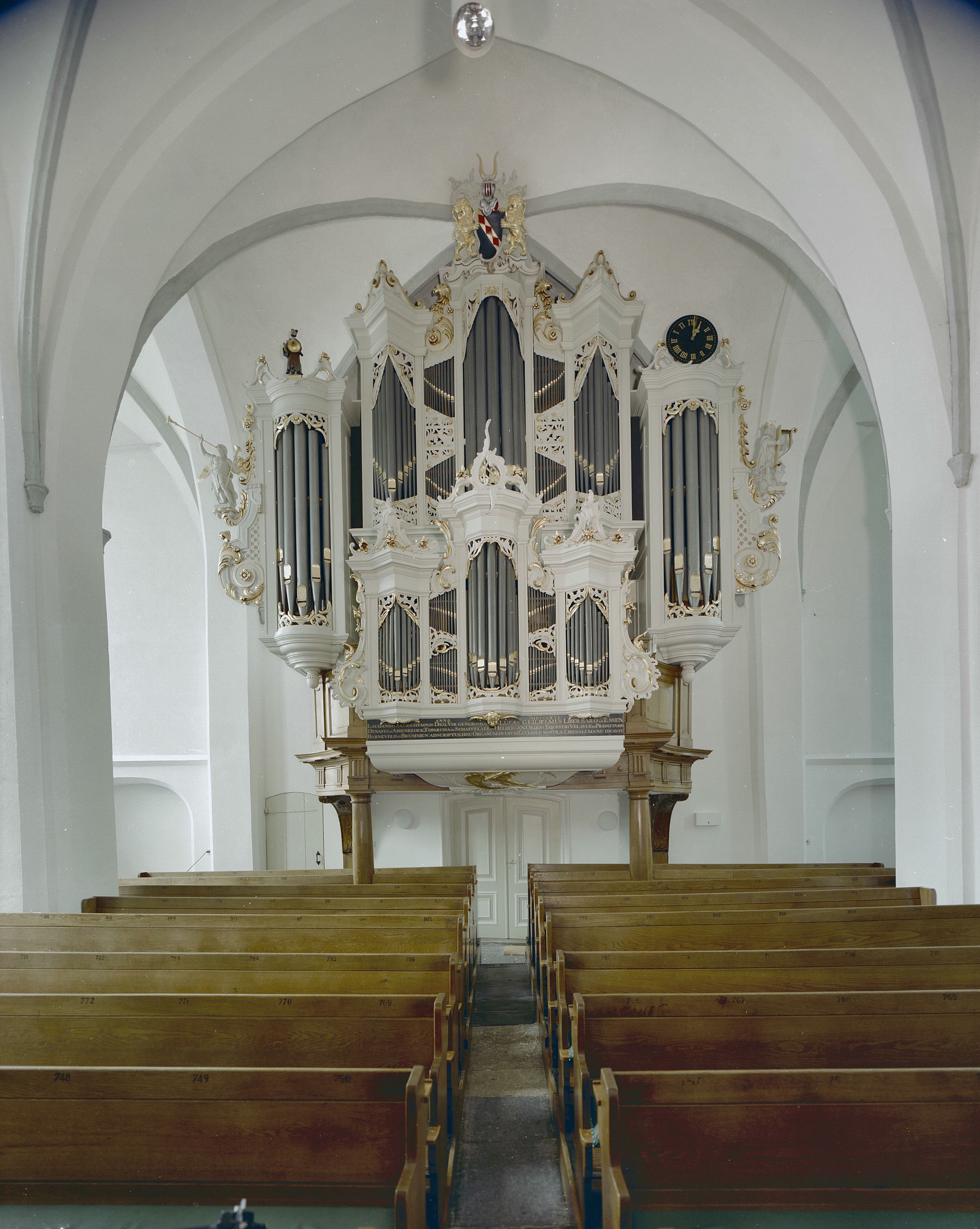 Nederlands Hervormde Kerk: Interieur, aanzicht orgel, orgelnummer 125 (opmerking: Gefotografeerd voor Het Historische Orgel in Nederland 1726-1769, bladzijder 323)